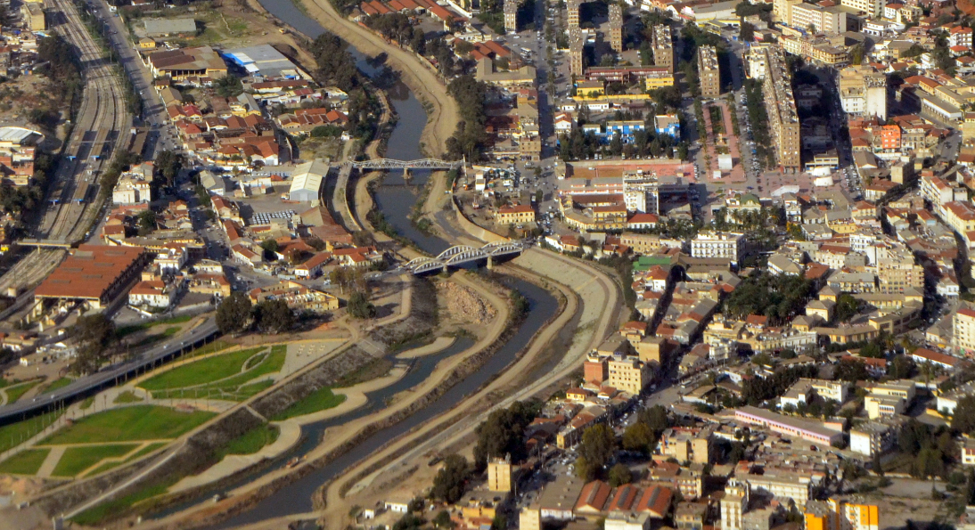 Vue aérienne de la commune d'El Harrach